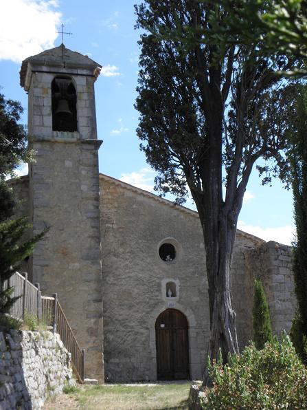 Chapelle N.D. de Beauvoir à Montferrat (83)